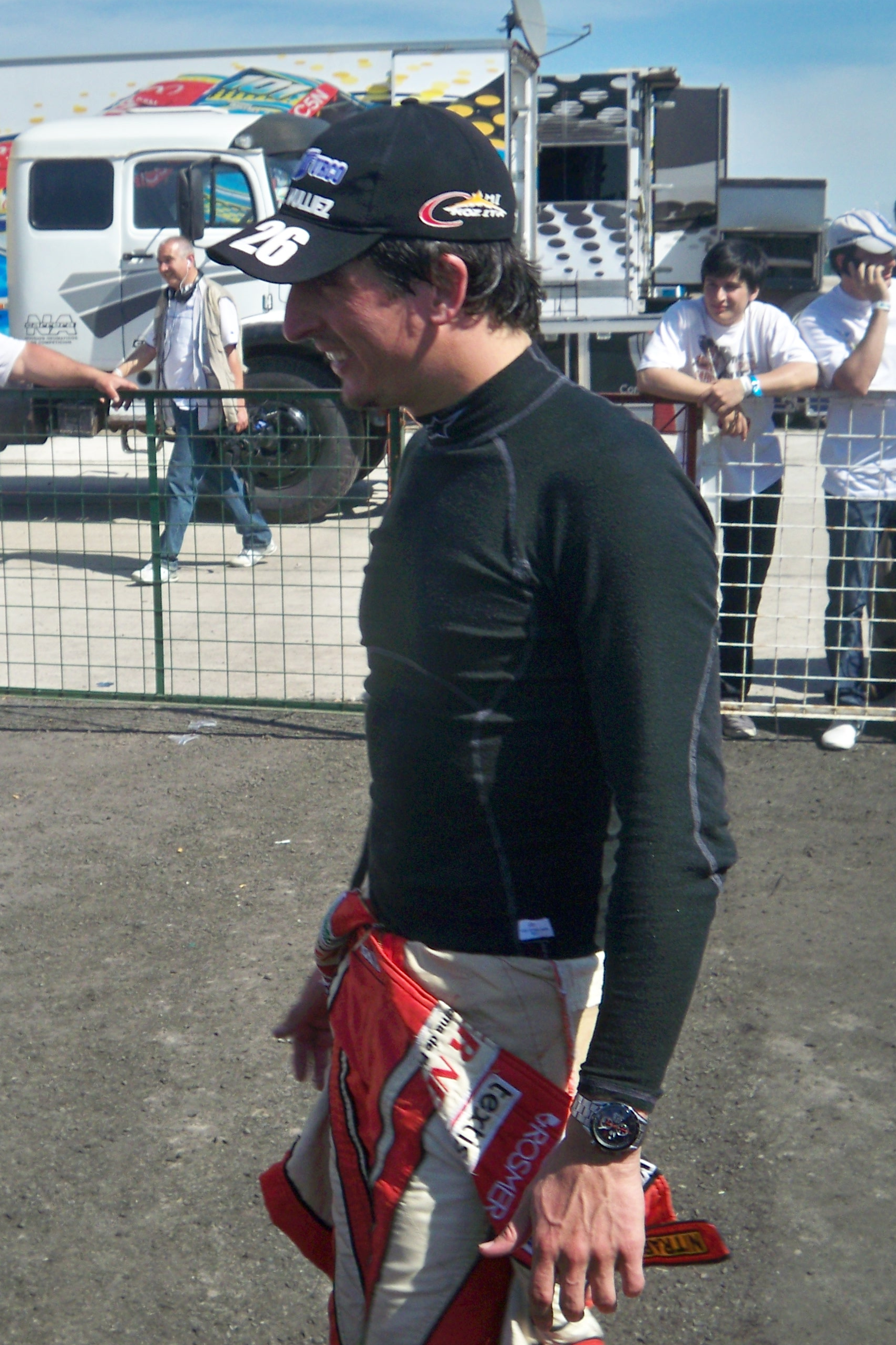 Juan Martín Trucco TC Paraná 2013